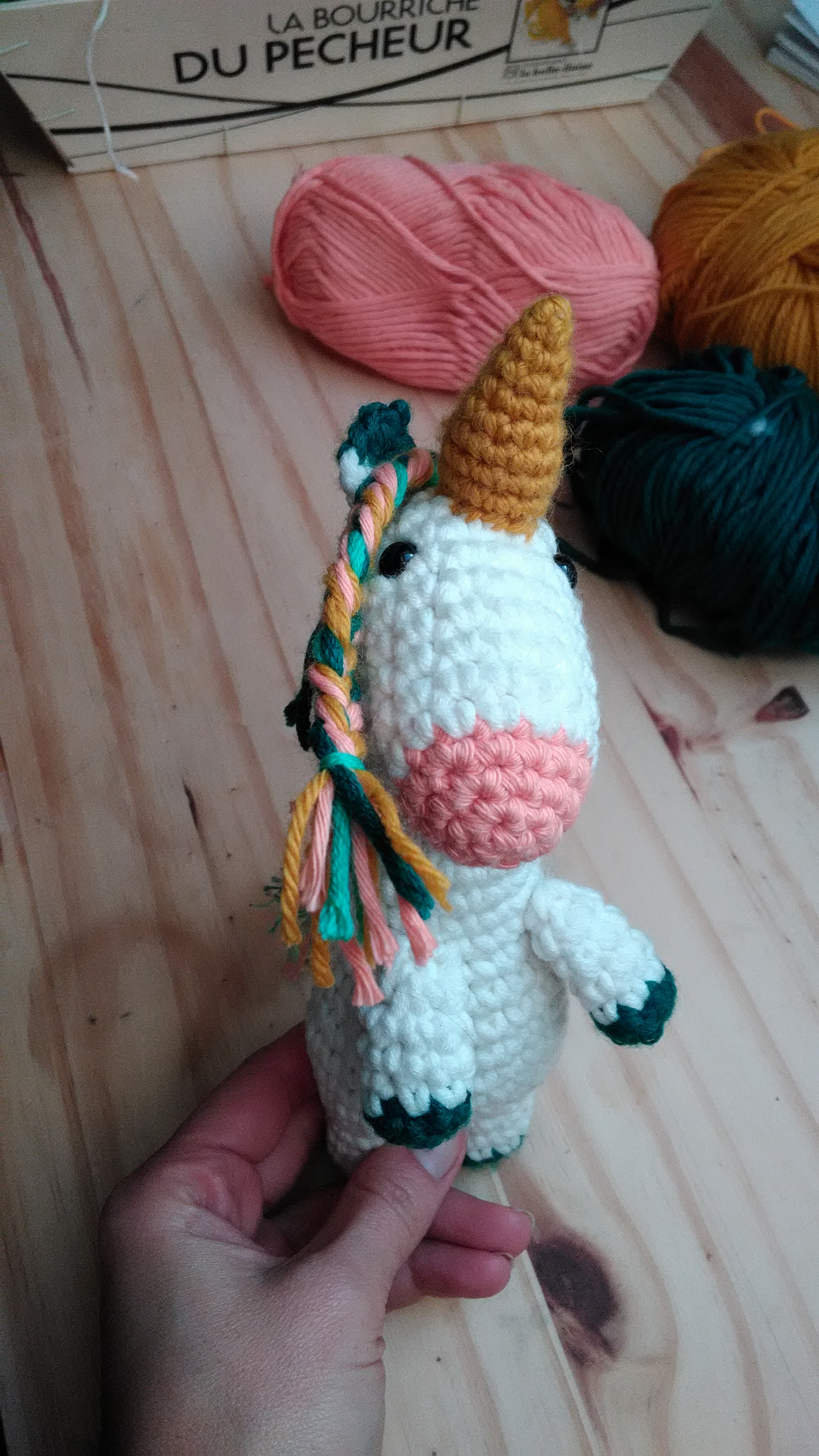 licorne réalisée au crochet